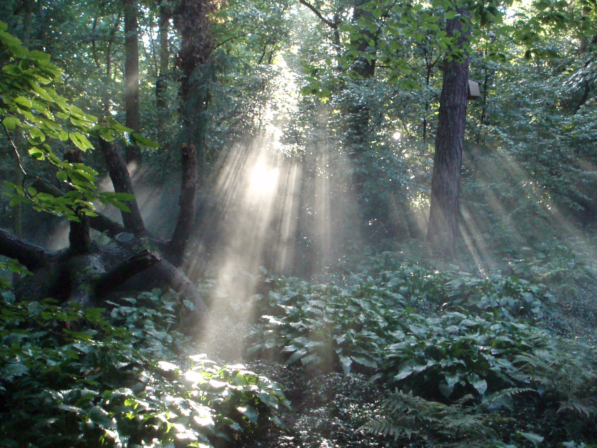 Zonnestralen in het Sprookjesbos in de Efteling.